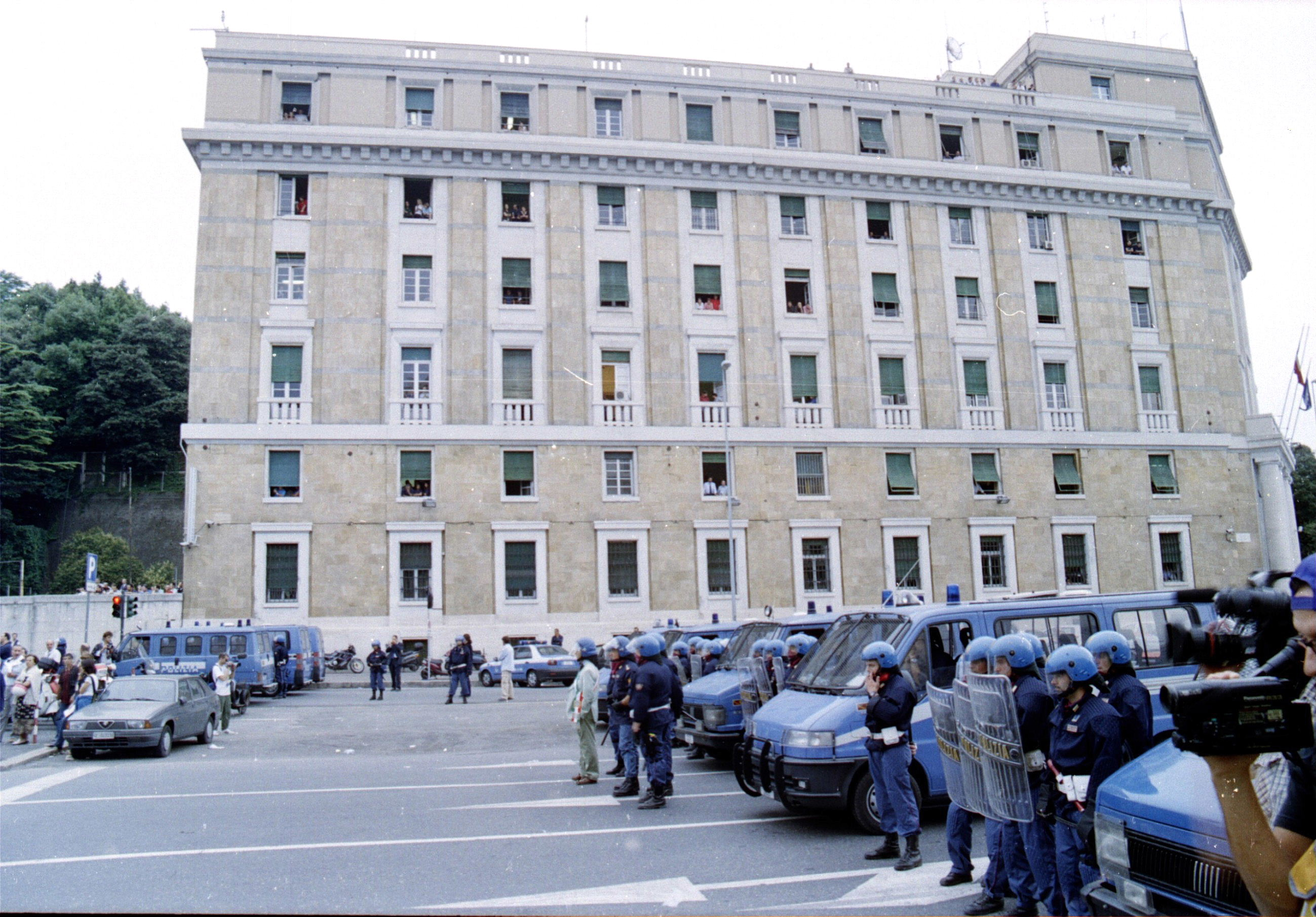 Genova - Fatti del G8 del 20 luglio 2001 La questura presidiata da ingenti forze di polizia